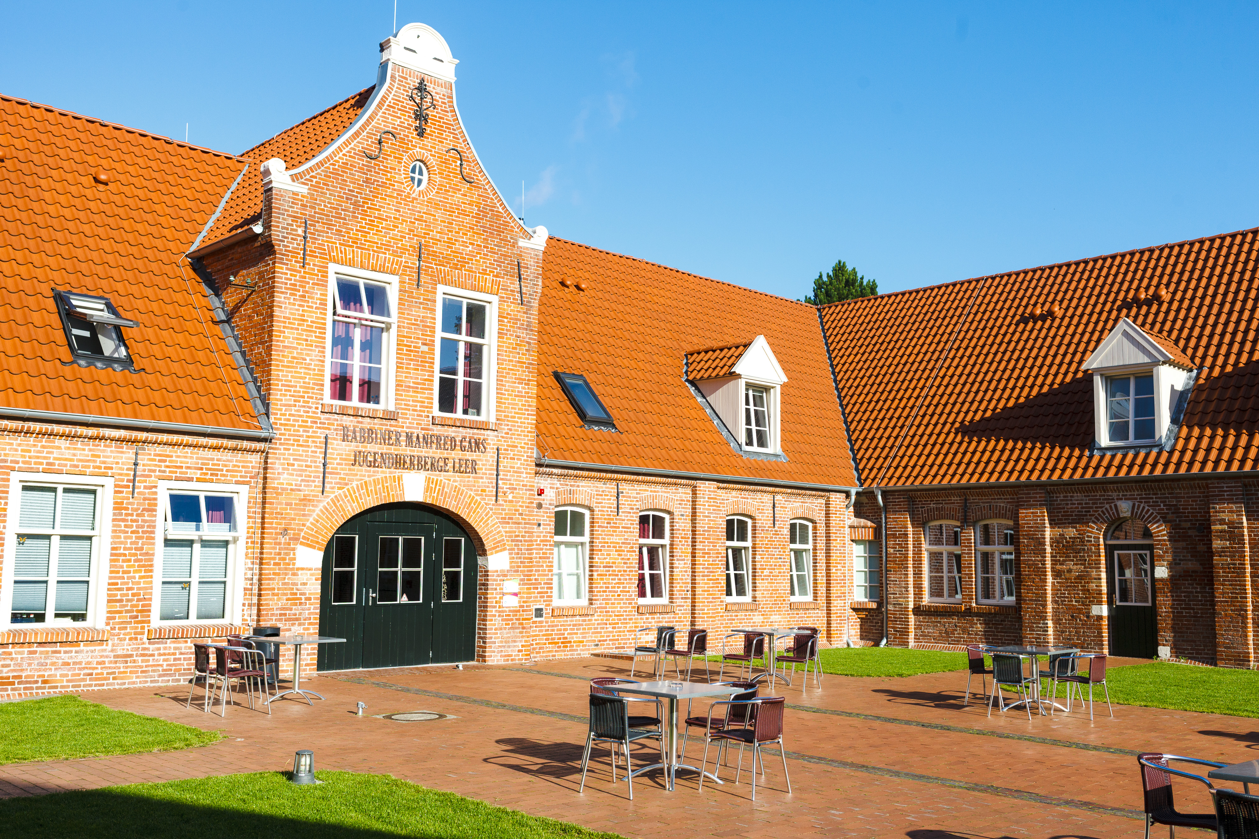 Die Jugendherberge Leer wurde im Mai 2012 als Integrationsbetrieb nach Komplettsanierung wieder eröffnet